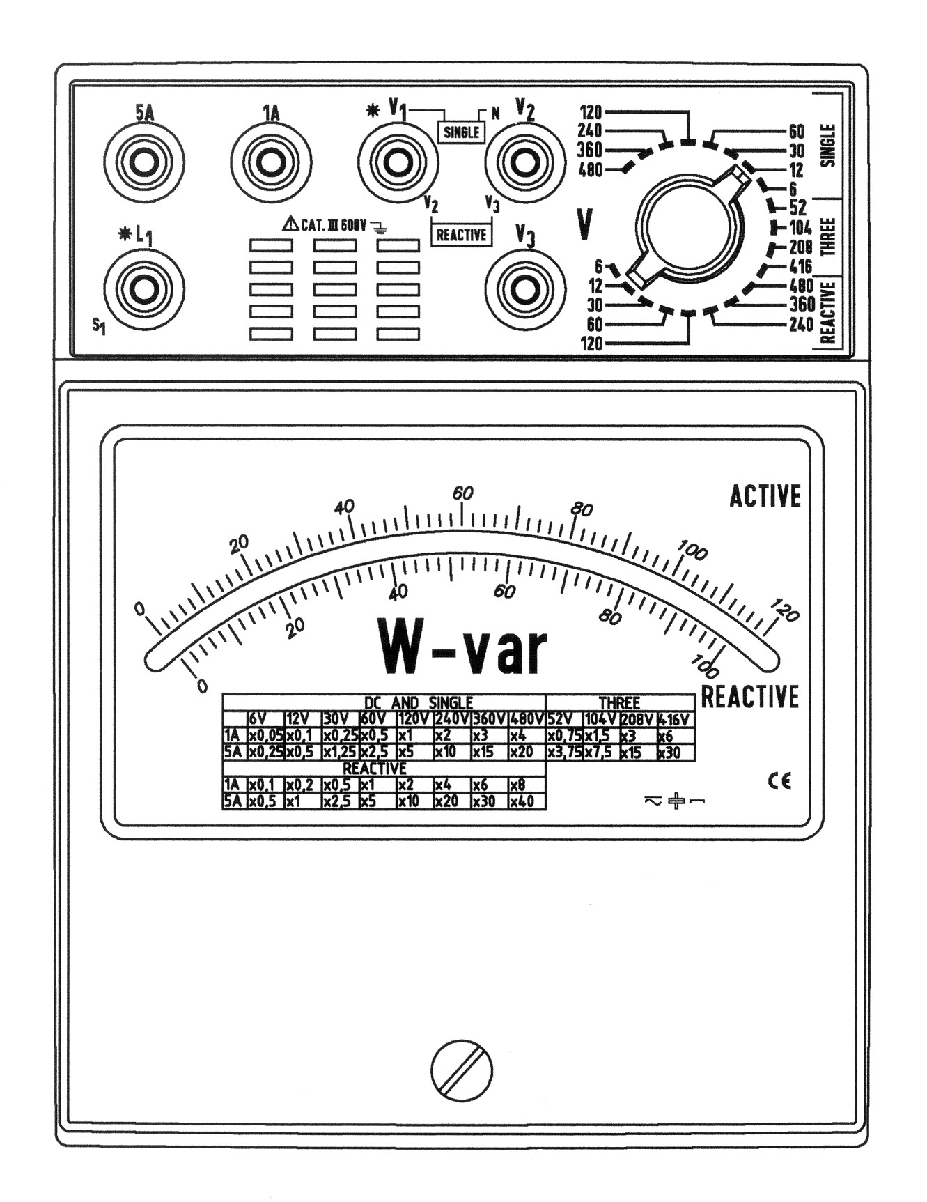 Kombinált hatásos- és meddő teljesítménymérő műszer